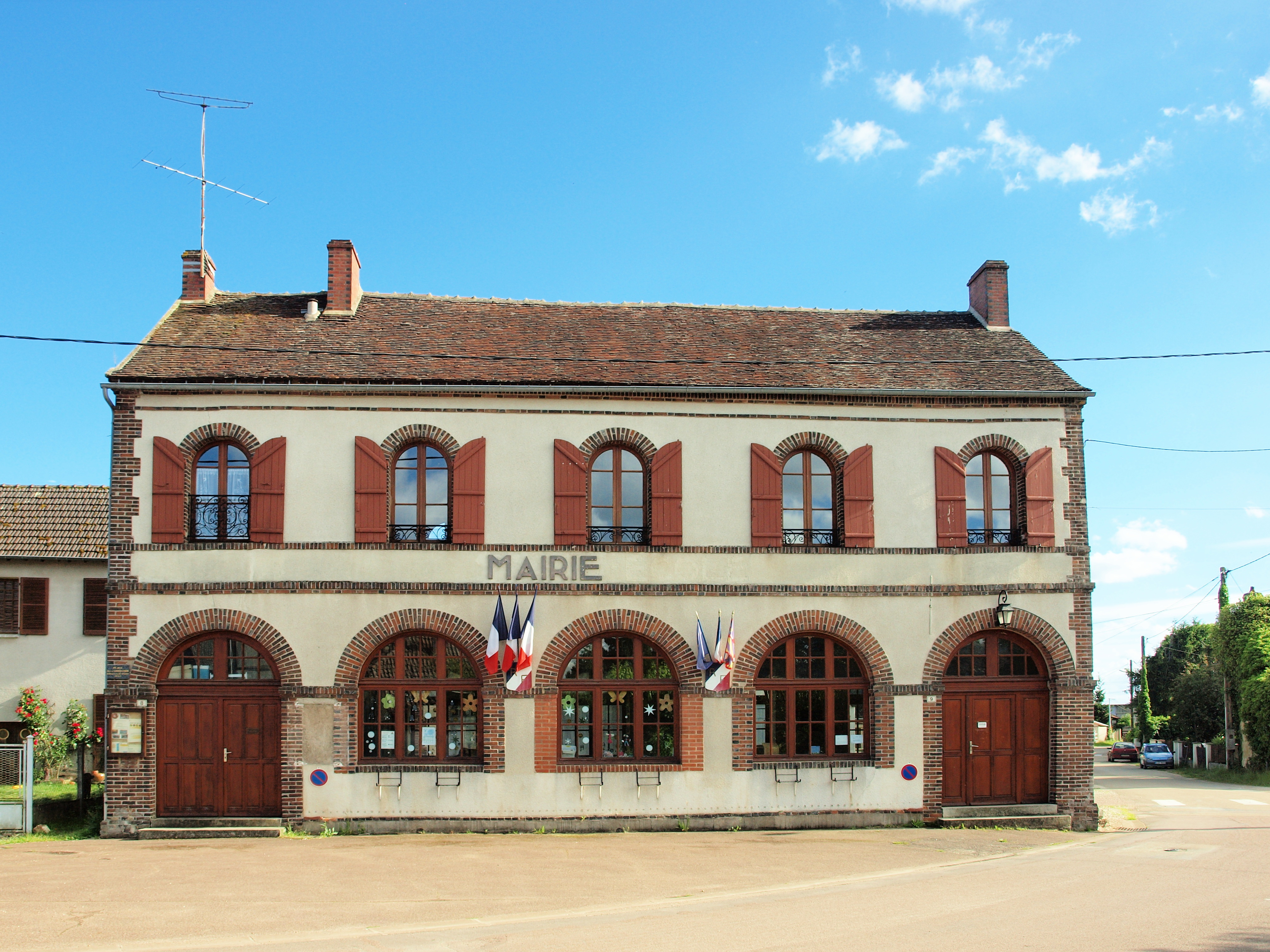 Mairie des Ormes (Yonne, France)